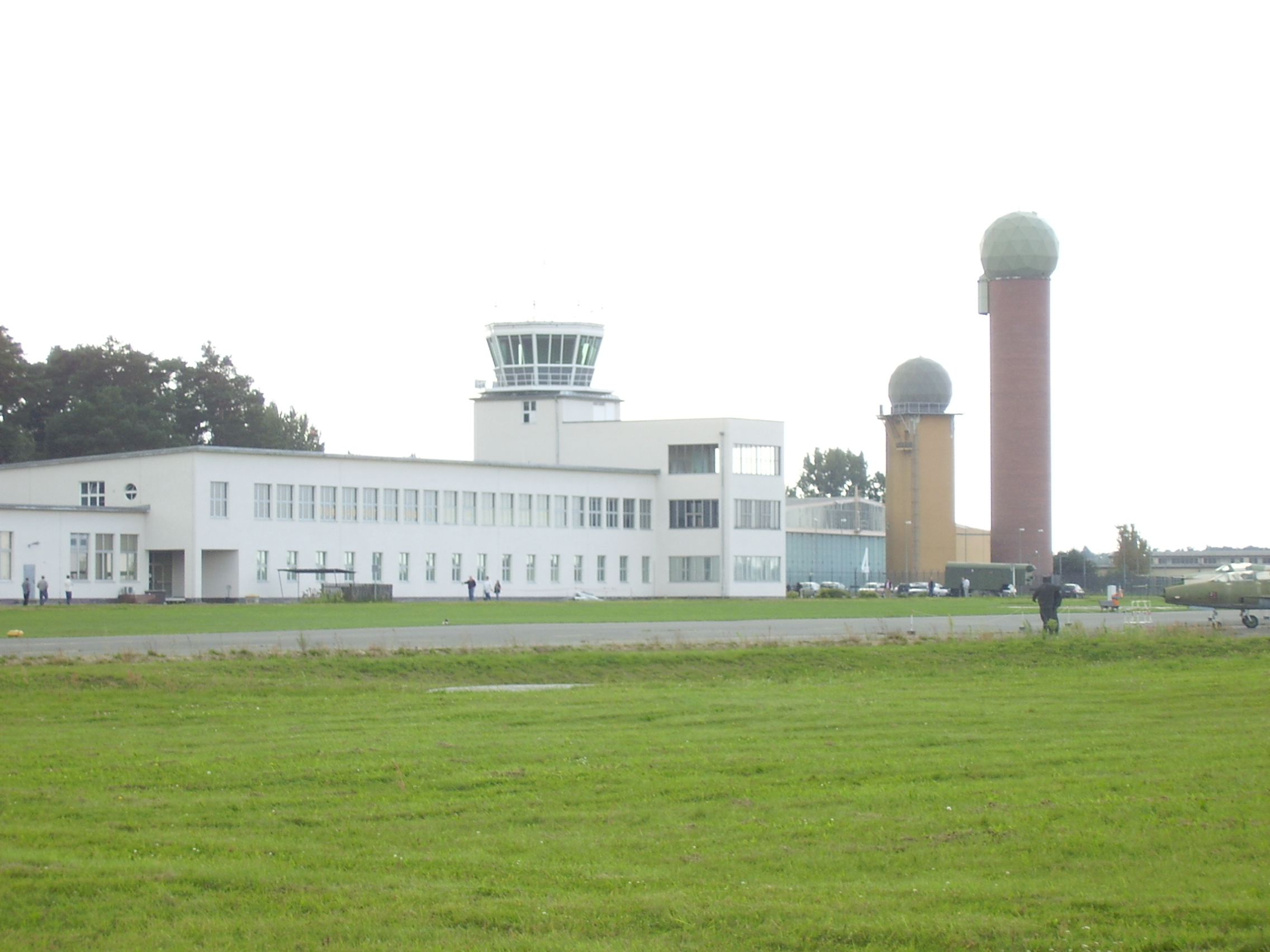 Luftwaffenmuseum der Bundeswehr; Airforce Museum of the Bundeswehr; Berlin-Gatow